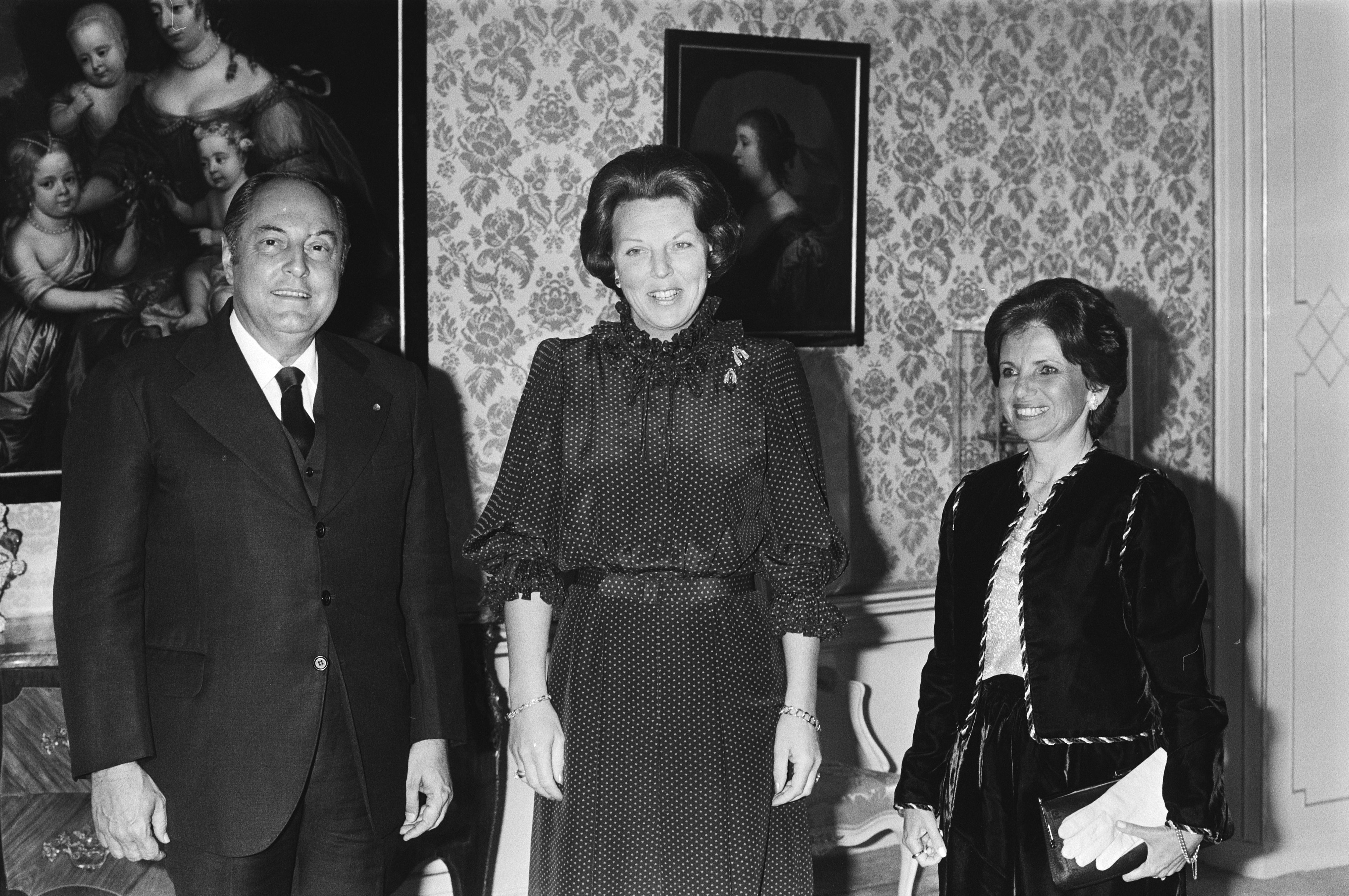 Collectie / Archief : Fotocollectie Anefo Reportage / Serie : [ onbekend ] Beschrijving : Koningin Beatrix ontvangt de vice-president van Brazilië Antonio Aureliano Chaves de Medonca en diens vrouw op Paleis Huis ten Bosch Datum : 4 oktober 1982 Locatie : Den Haag, Zuid-Holland Trefwoorden : koninginnen, ontvangsten, paleizen, vice-presidenten Persoonsnaam : Beatrix, koningin, Chaves de Medonca, Antonio Aureliano Fotograaf : Croes, Rob C. / Anefo Auteursrechthebbende : Nationaal Archief Materiaalsoort : Negatief (zwart/wit) Nummer archiefinventaris : bekijk toegang 2.24.01.05 Bestanddeelnummer : 932-3509